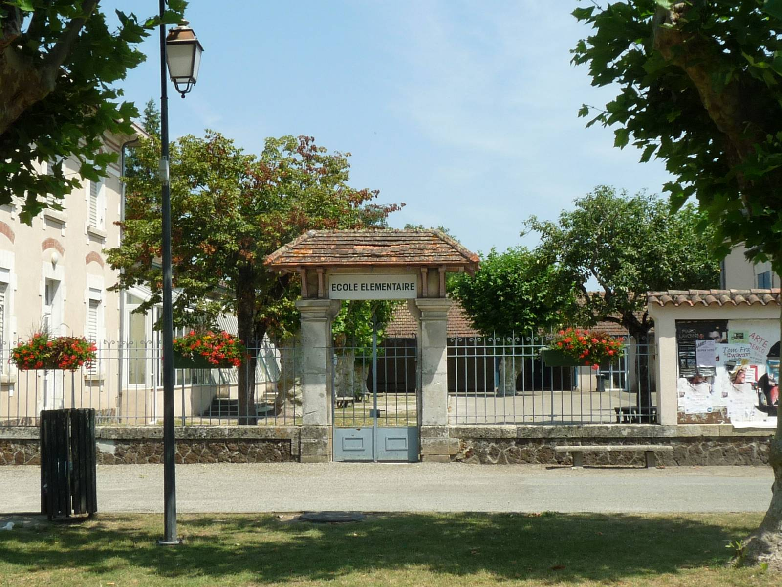 entrée de l'école de Sabres, Landes, France